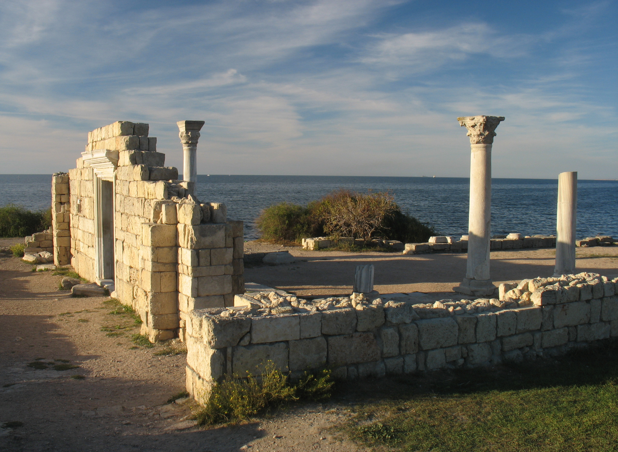 Херсонес Таврійський